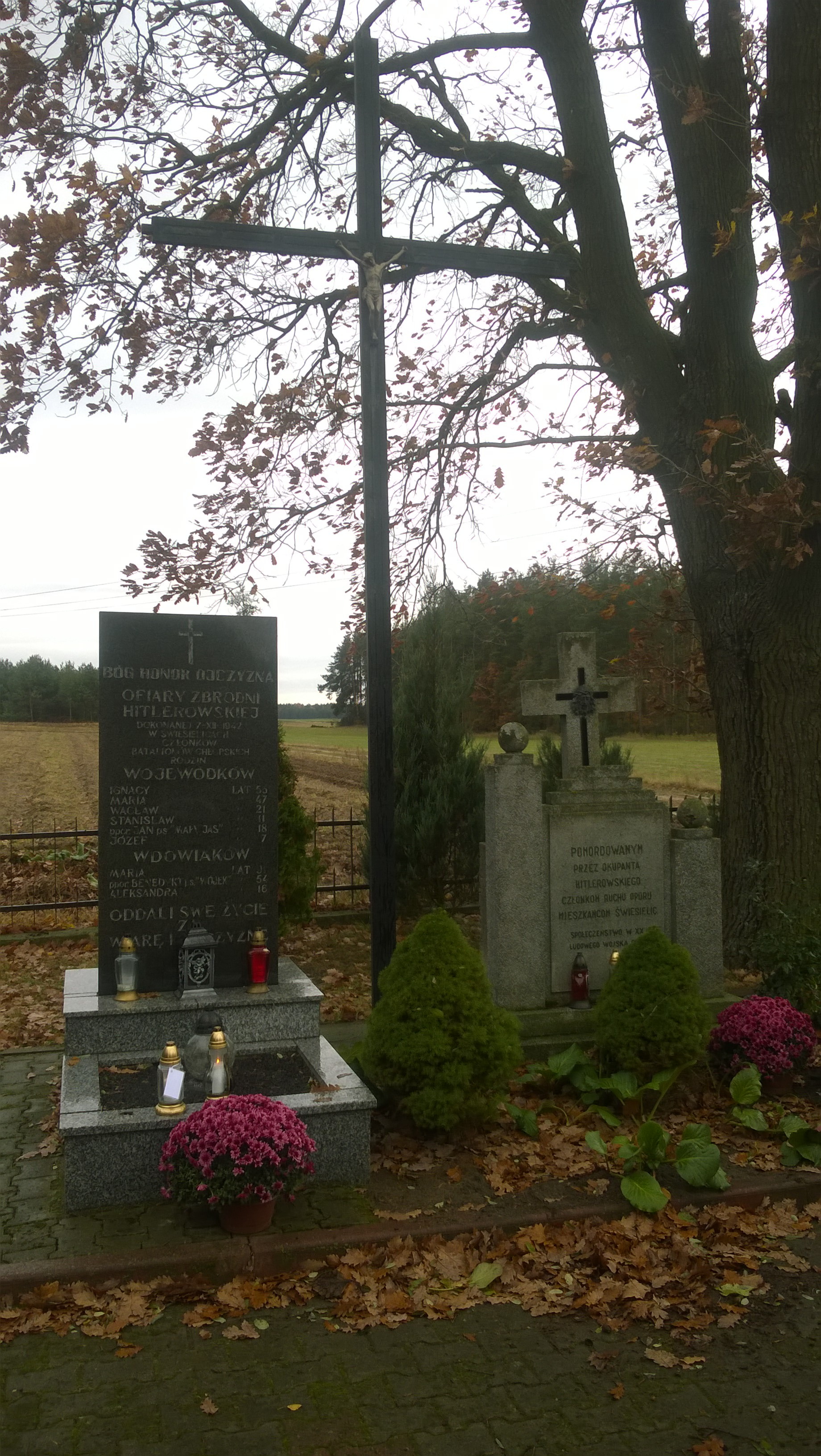 Pomniki zbrodni w Świesielicach. Jeden poświęcony mieszkańcom wsi, drugi rodzinom Wojewódków i Wdowiaków.